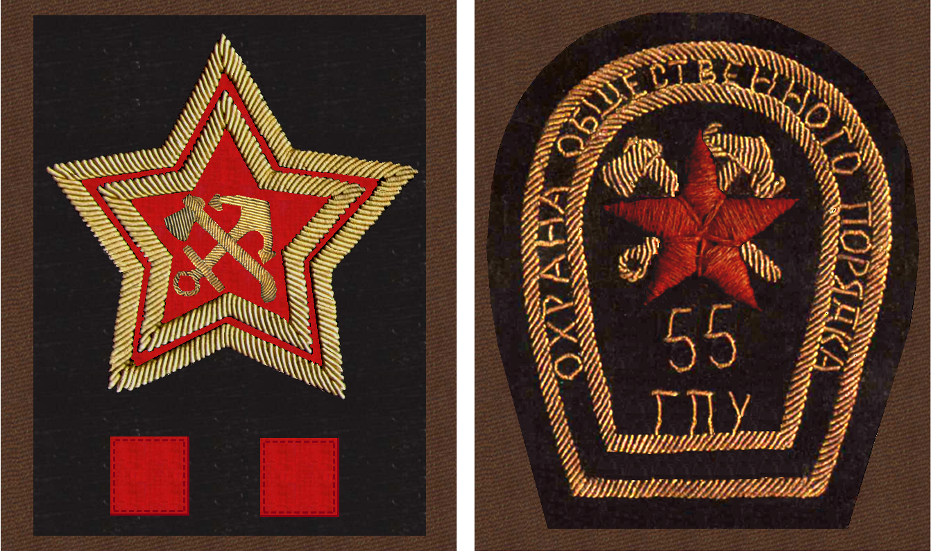 нарукавный знак ТОГПУ 1920